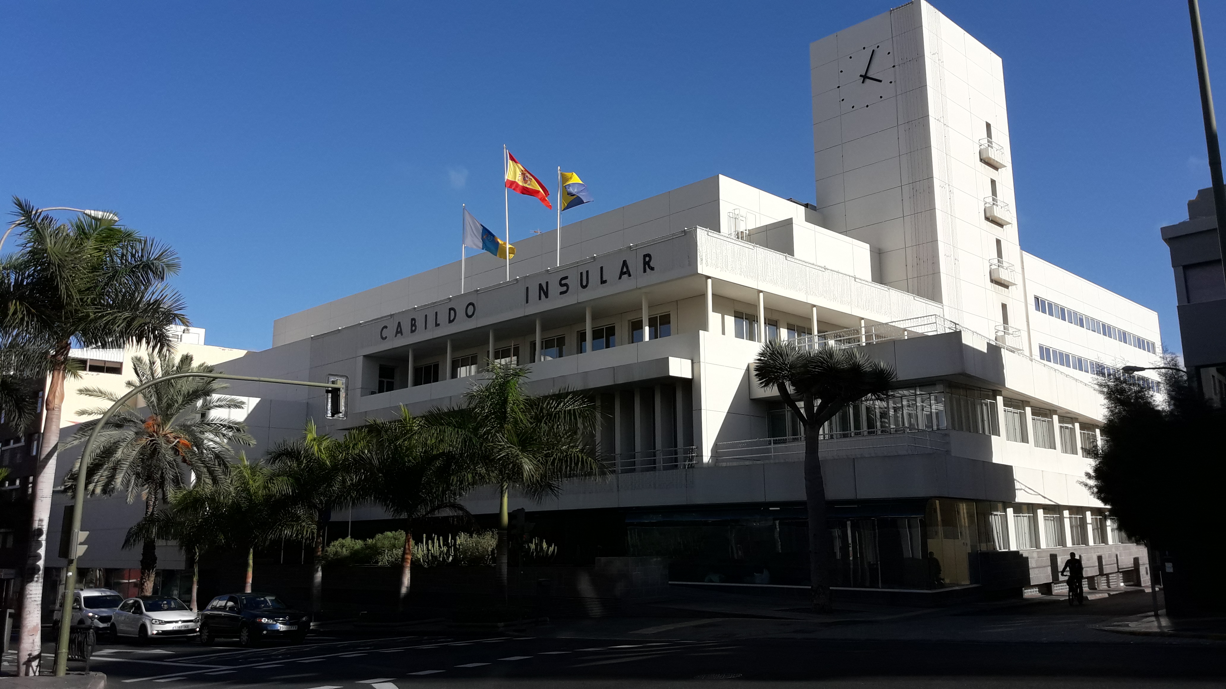 fachada delantera del edificio reformado del Cabildo Insular de Gran Canaria.